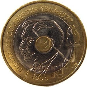 Revers de la pièce de 20 francs de 1994 commémorative Pierre de Coubertin.